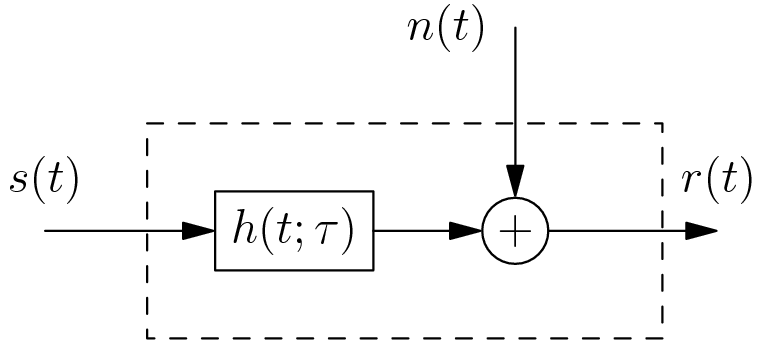 Linear Time-variant Channel Model, 信道